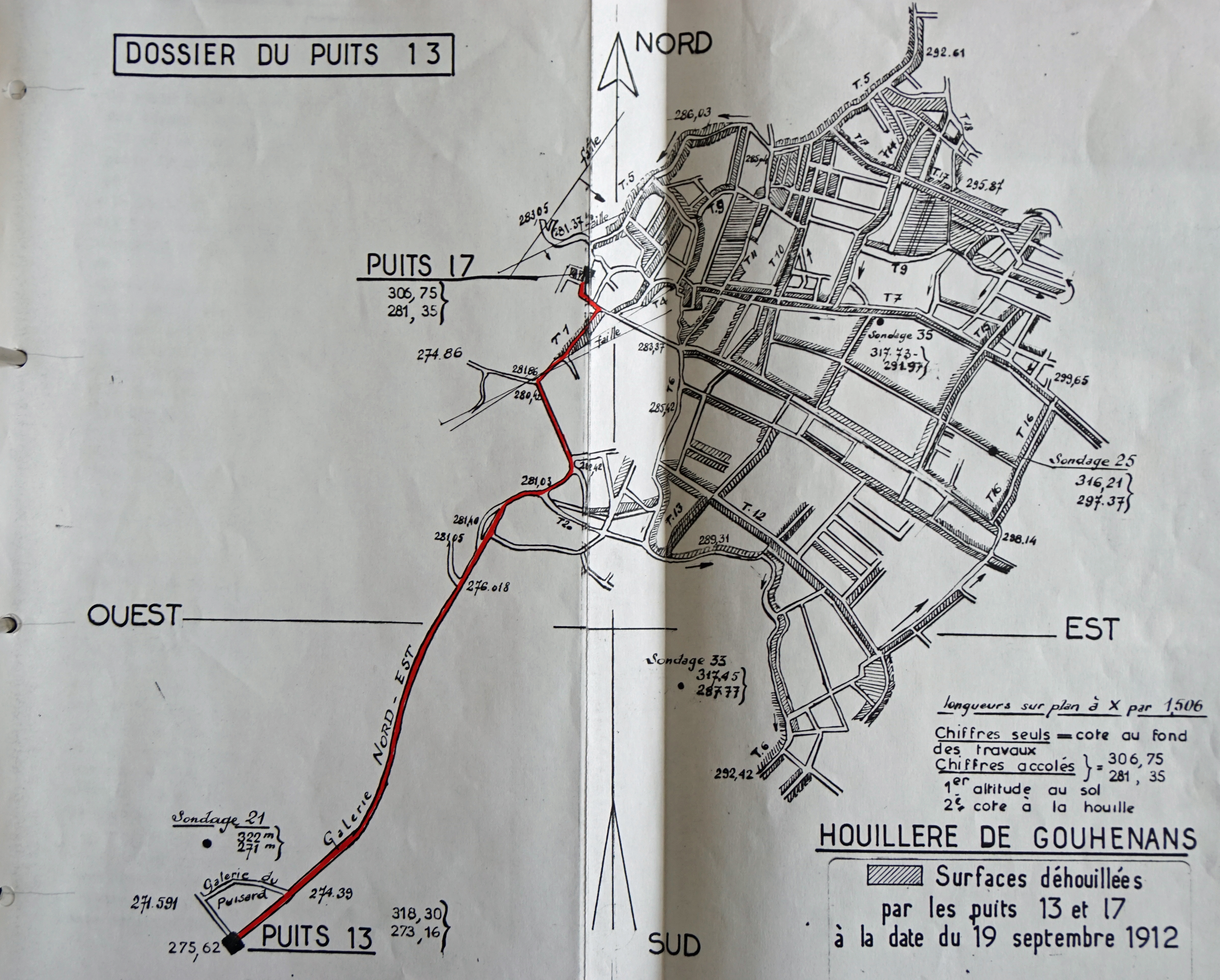 Plan des travaux des puits n° 13 et 17 des houillères de Gouhenans.